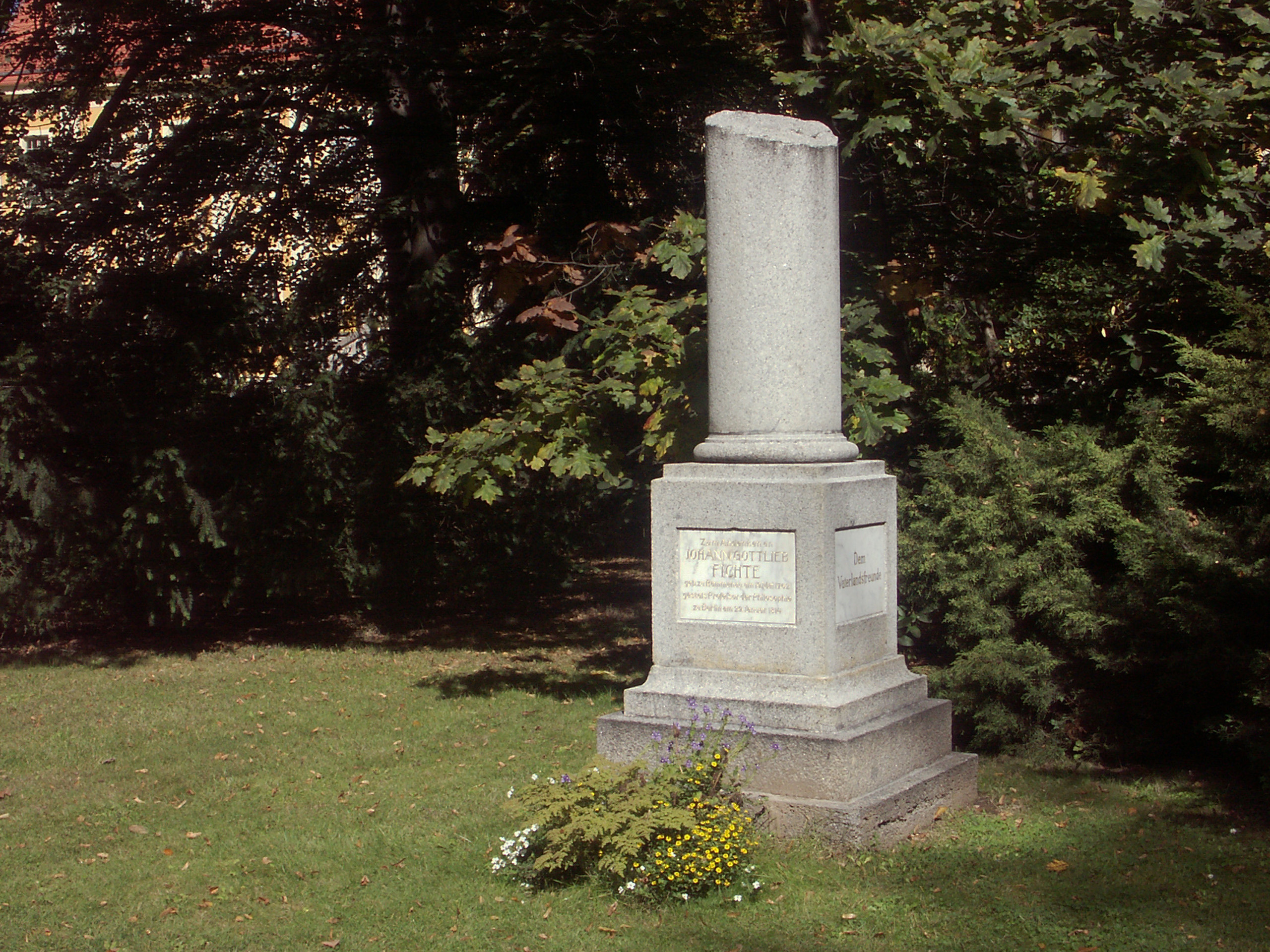 Das Fichtedenkmal im Schlosspark Rammenau